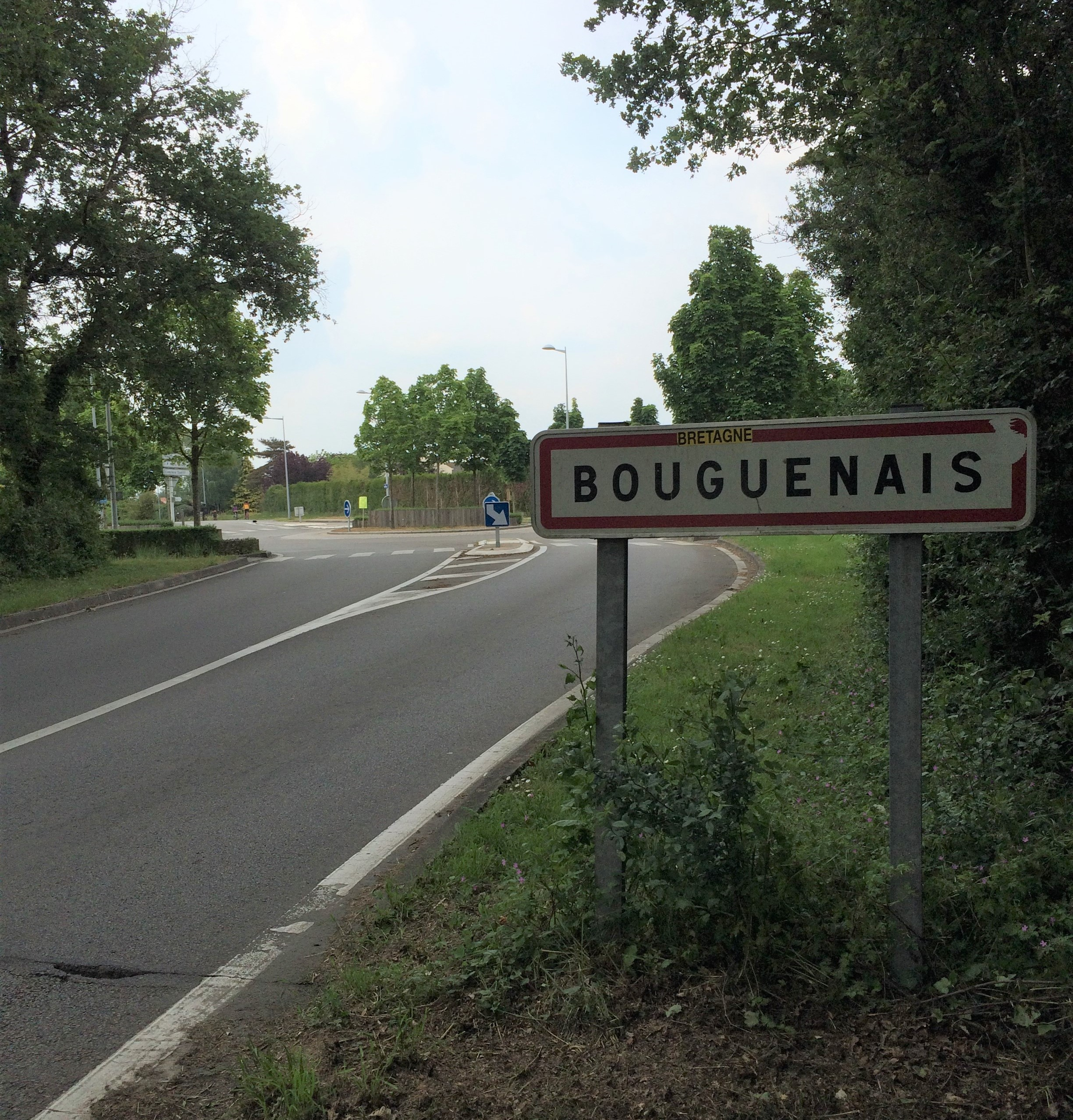 Entrée de la commune de Bouguenais